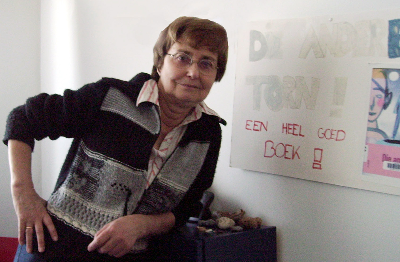 Gil vander Heyden (Hoboken, Antwerpen, 30 mei 1937), een Vlaams auteur van kinder- en jeugdboeken en dichter, in haar werkkamer. Eigen werk van Rushmore. Gemaakt op 12.06.2005.